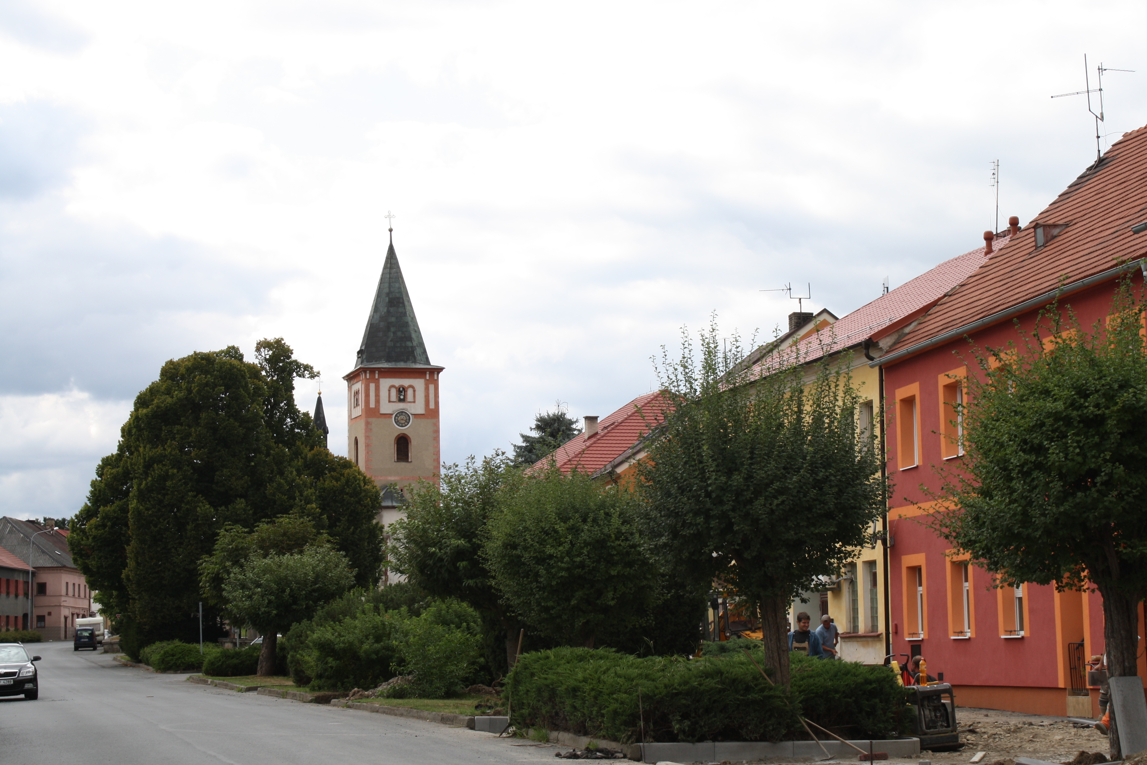 Stráž / Tachov District (deutsch: Neustadtl Bezirk Tachau)